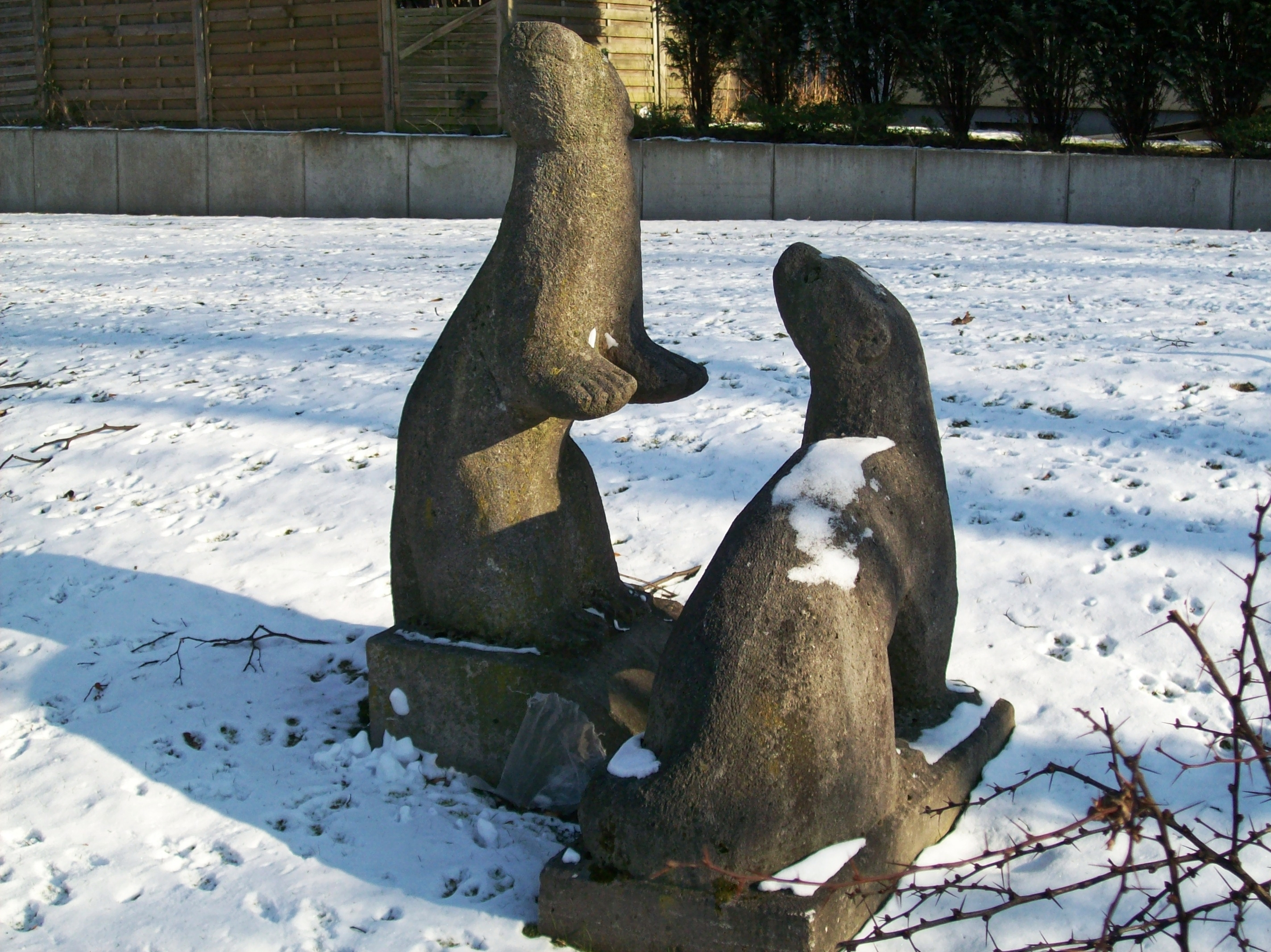 Steilshoop, Hamburg, Germany. Zwei Fischotter von Martin Irwahn aus dem Jahre 1959.